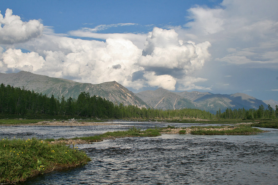 Река Баргузин в Амутской котловине